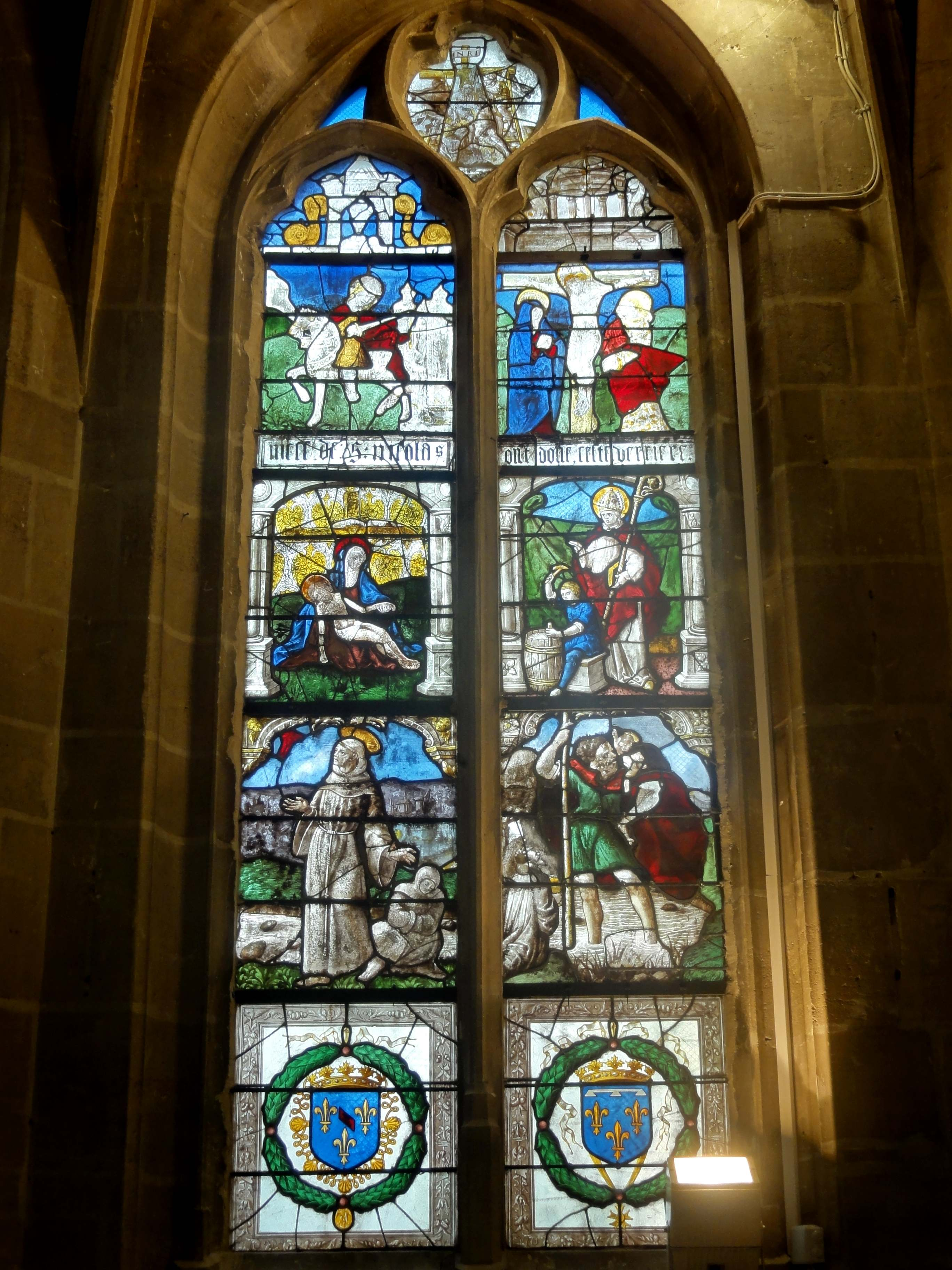 Verrière n° 4.